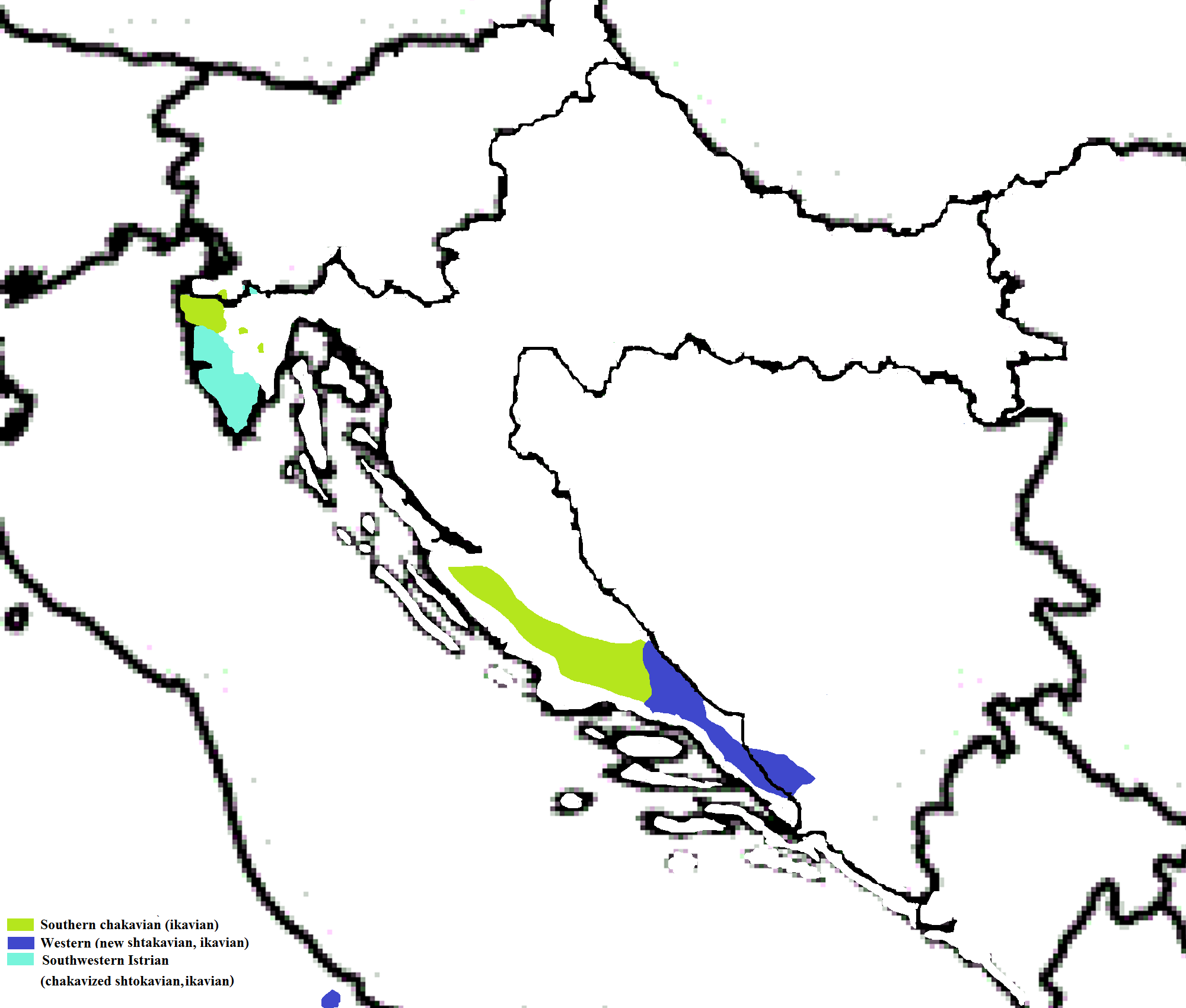 Migracija iz Cetinsko-biokovskog i donje zapadnohumskog dijalekta u Molise i jugozapadnu istru (preko Zadra) Migracija sa sjevera Dalmacije u na sjeverozapad Istre